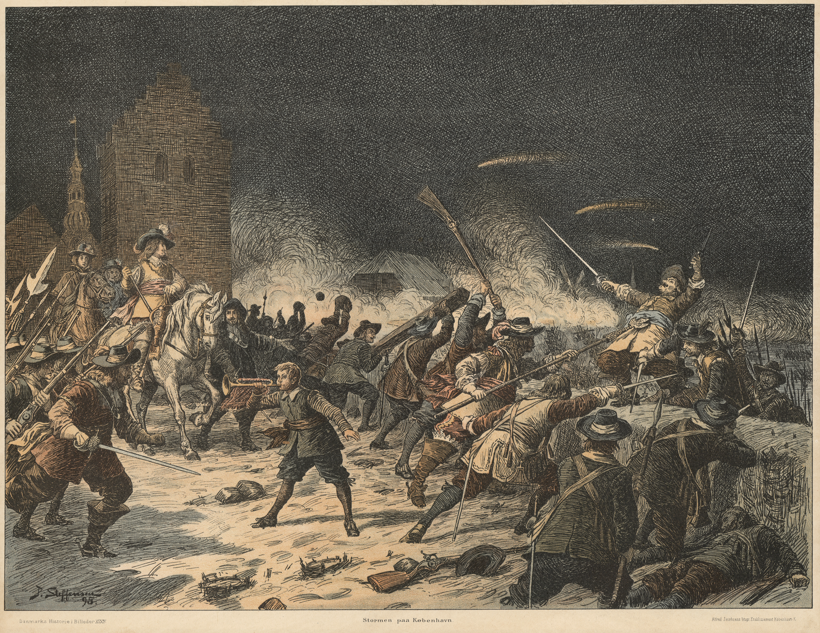 Danmarks Historie i Billeder. XXXIX: Stormen på København. Farvelitografi på papir opklæbet på pap. Nederst: Sign. P. Steffensen 95. Danmarks Historie i Billeder XXXIX. Stormen paa København. Alfred Jacobsens litogr. Etablissement, København K. Samlingen omfatter 50 billeder, mus.nr. 17.001-17.049. Nr. VI og L mangler. Samlingen er udgivet i 1898, se V.E. Clausen: Folkelig grafik i Skandinavien, 1973 s. 144. 70.9 Cl f. Udstillet i juli-august 1906 iflg. årsberetning 1906-07. 1 dublet, er modtaget fra N. Zahles Gymnasieskole i november 1979 tillige med 2 prøvetryk af billederne fra Lærerstandens Adresseavis, 2. juni 1892, med foromtale af billederne. Denne version er beskåret og hældningsjusteret.